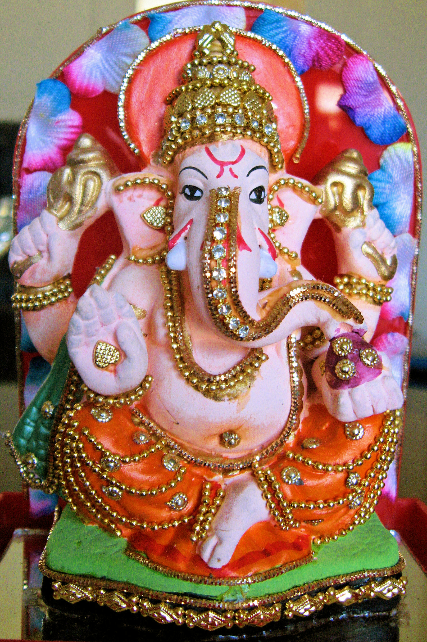 Hindu God Ganesh